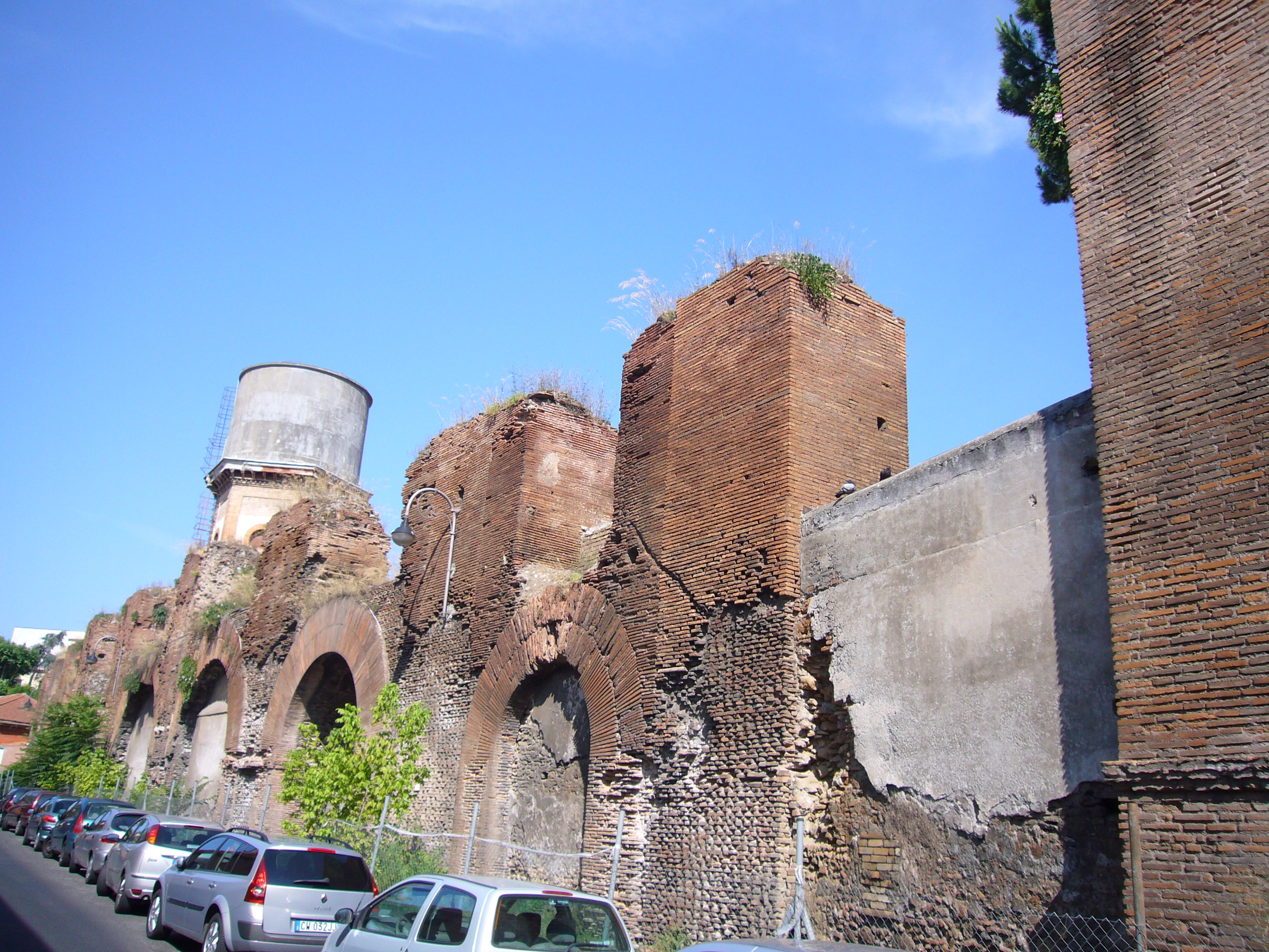 Roma, acquedotto neroniano a via di Santo Stefano Rotondo